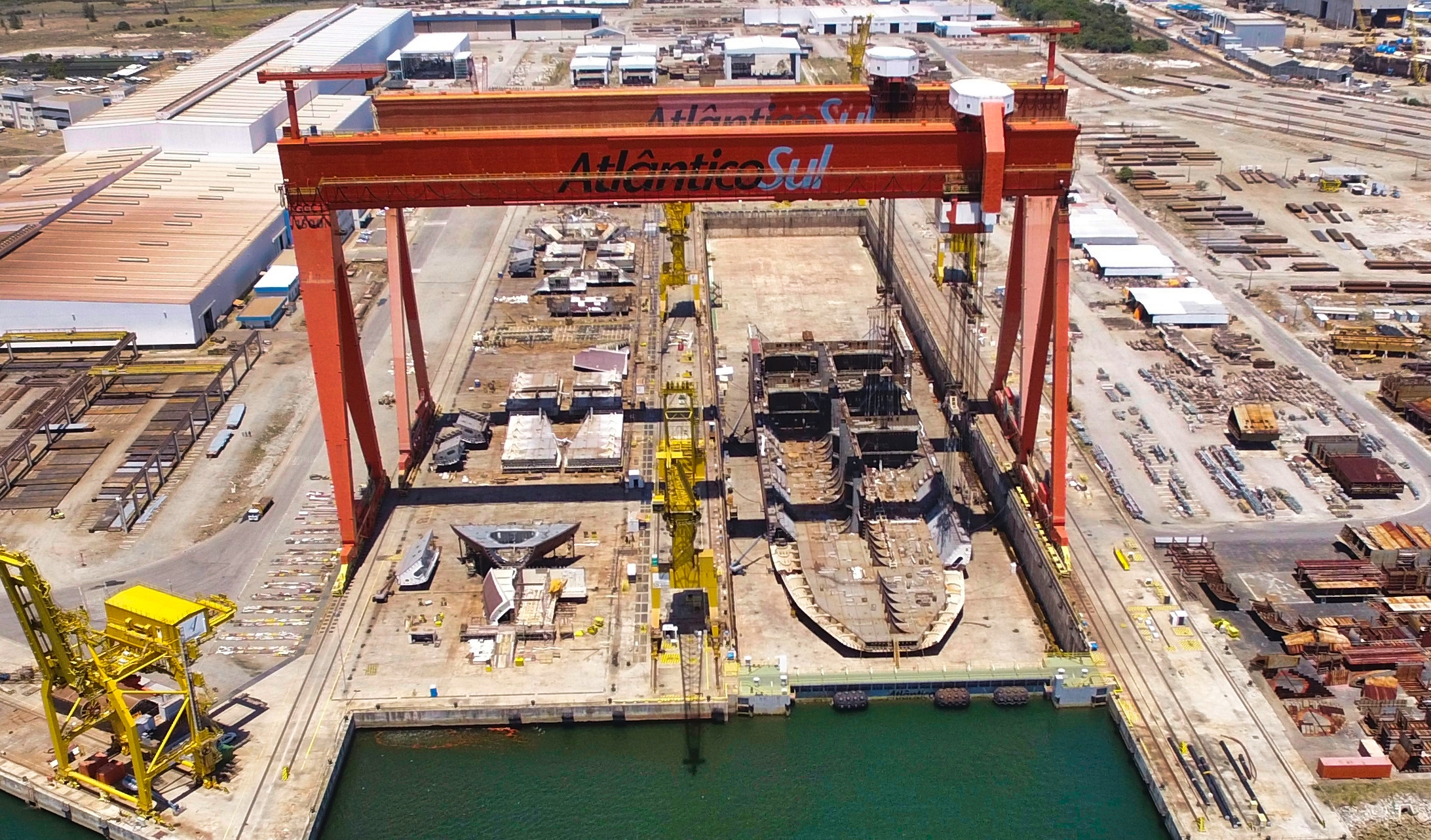 DCIM\100MEDIA\DJI_0054.JPG